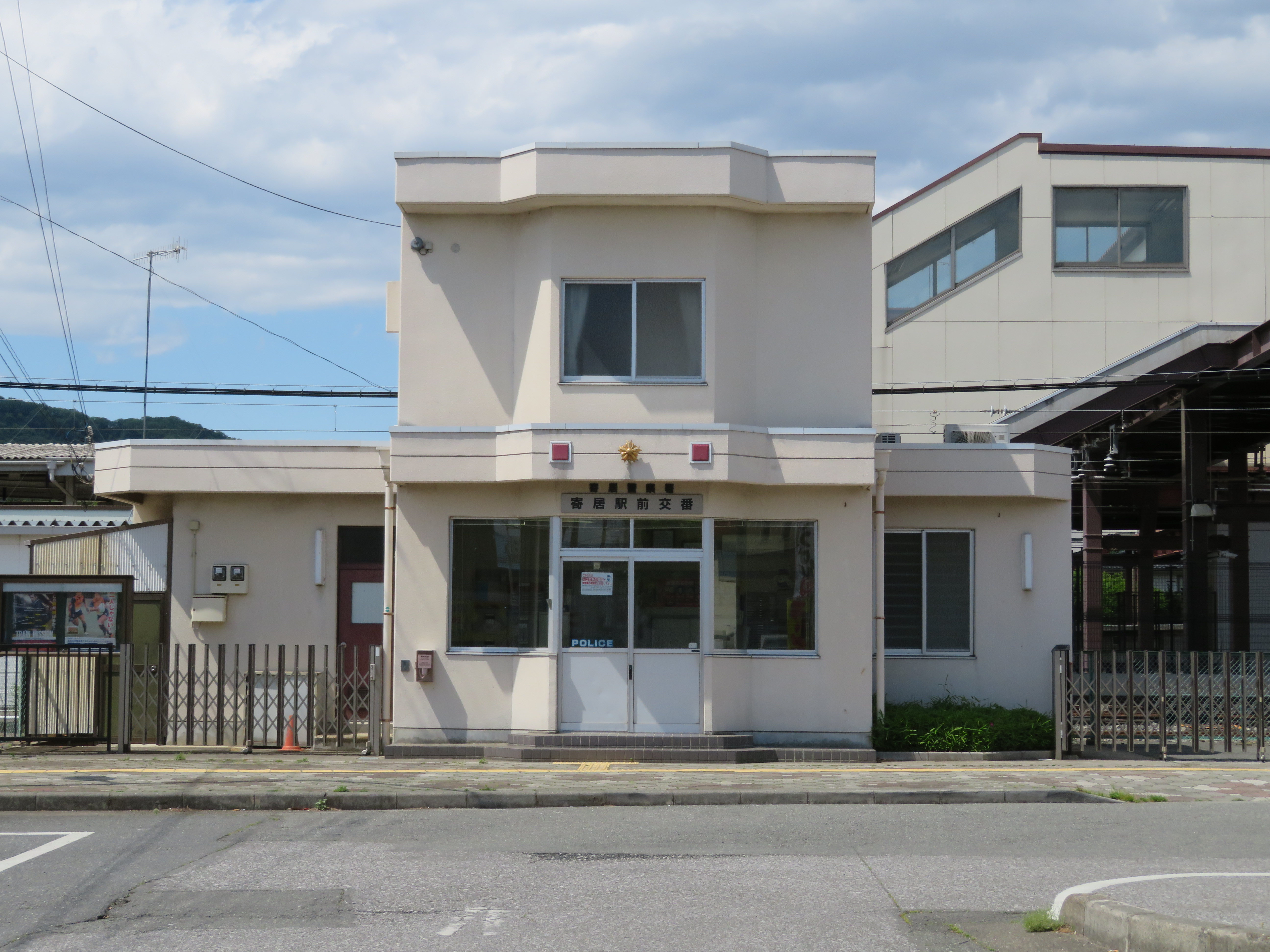 寄居警察署寄居駅前交番 Canon PowerShot SX720 HS